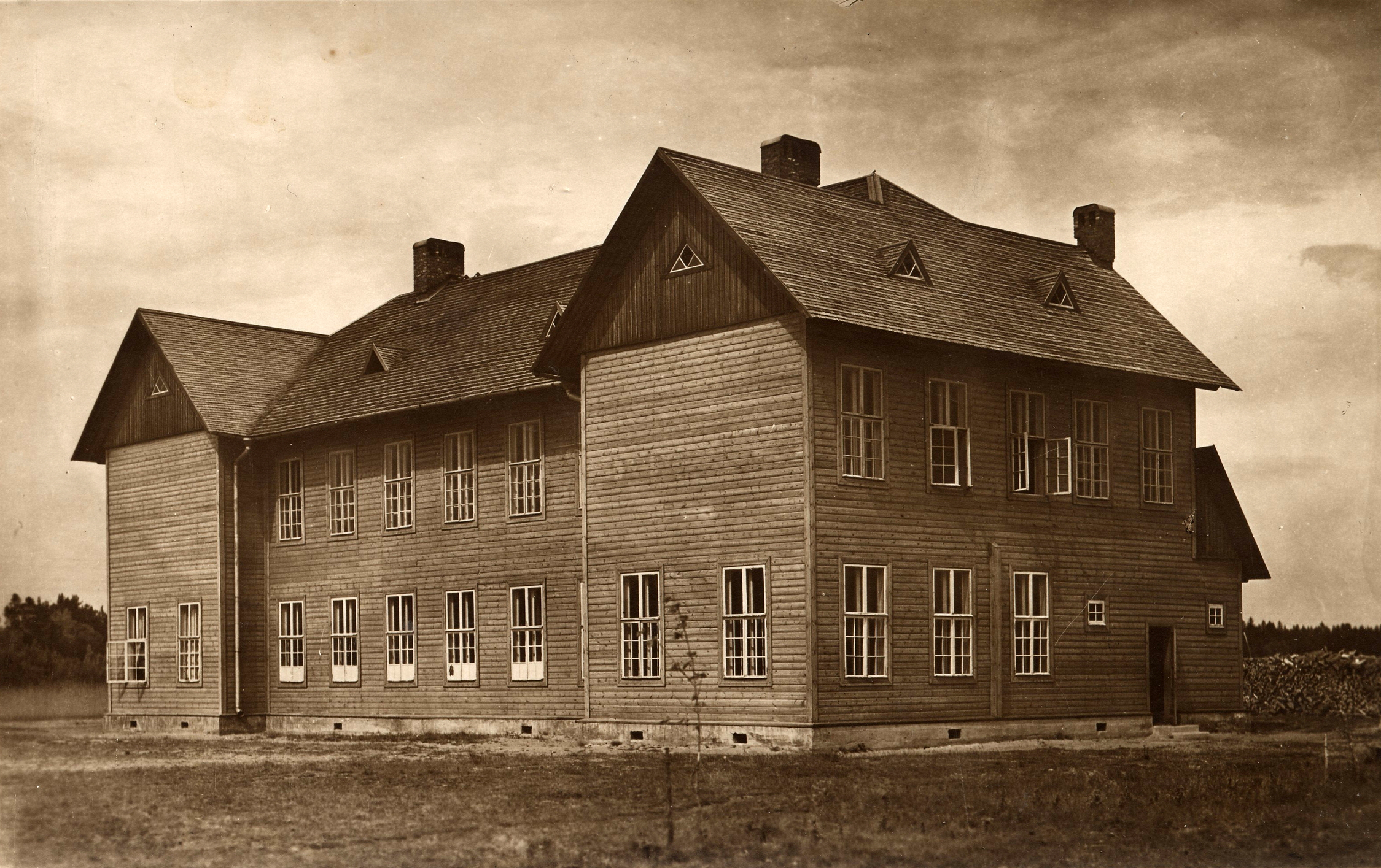 Ingeri Kallivere kool